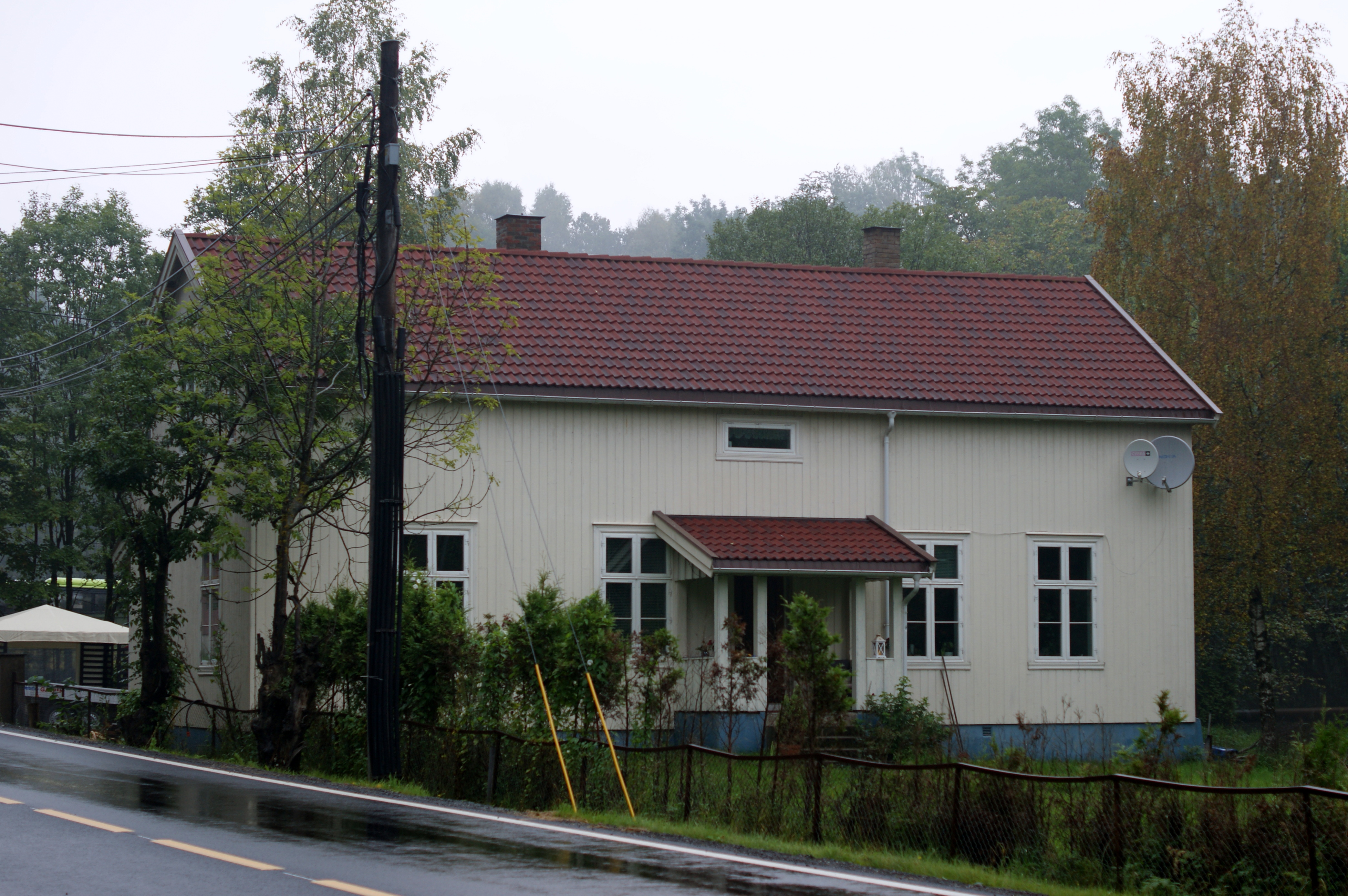 Bjørum var skole i Bærum fra 1880 til 1901. Bildet er tatt 2011